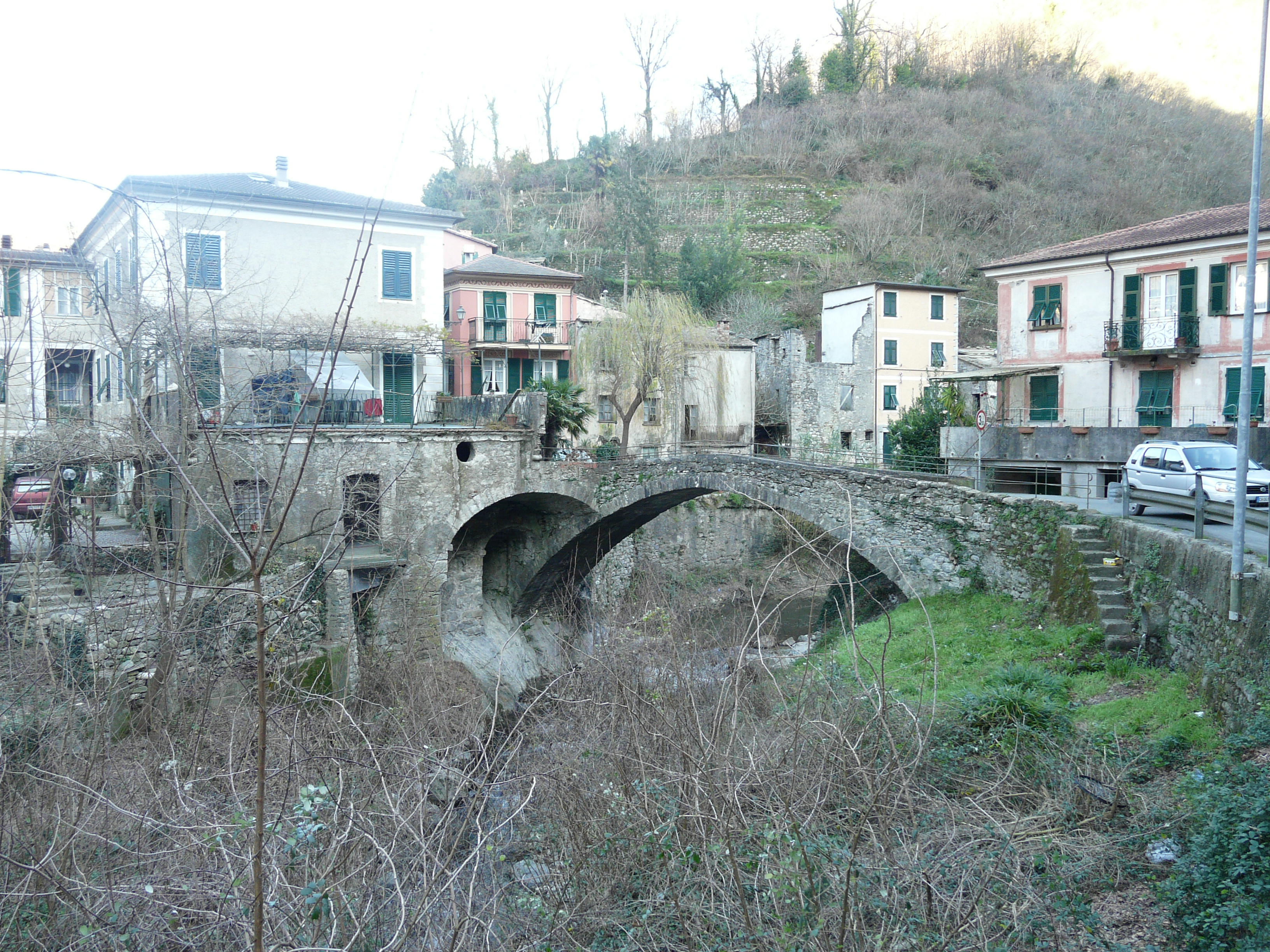 Ponte in stile romanico sul torrente Mezzanego, Comune di Mezzanego, Liguria, Italia